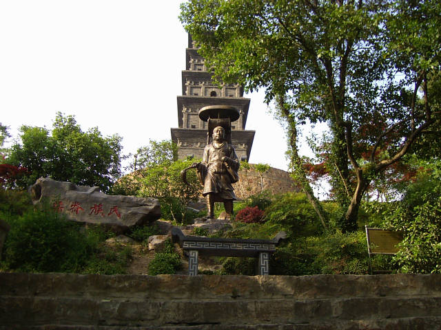 九華山公園 玄奘像 2004年4月28日撮影 撮影者：権作 参照：